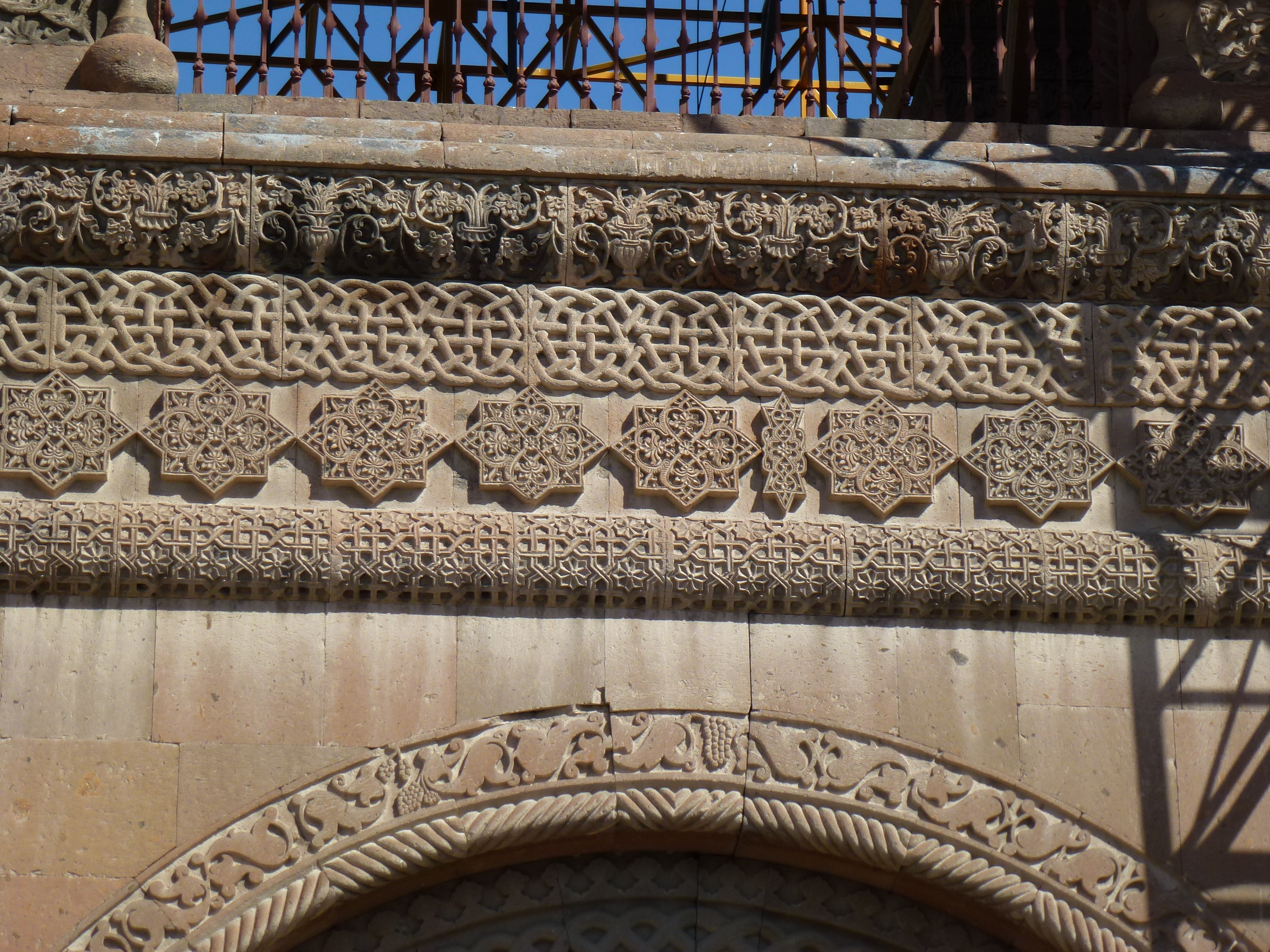 Էջմիածնի Մայր տաճար 2/14.1